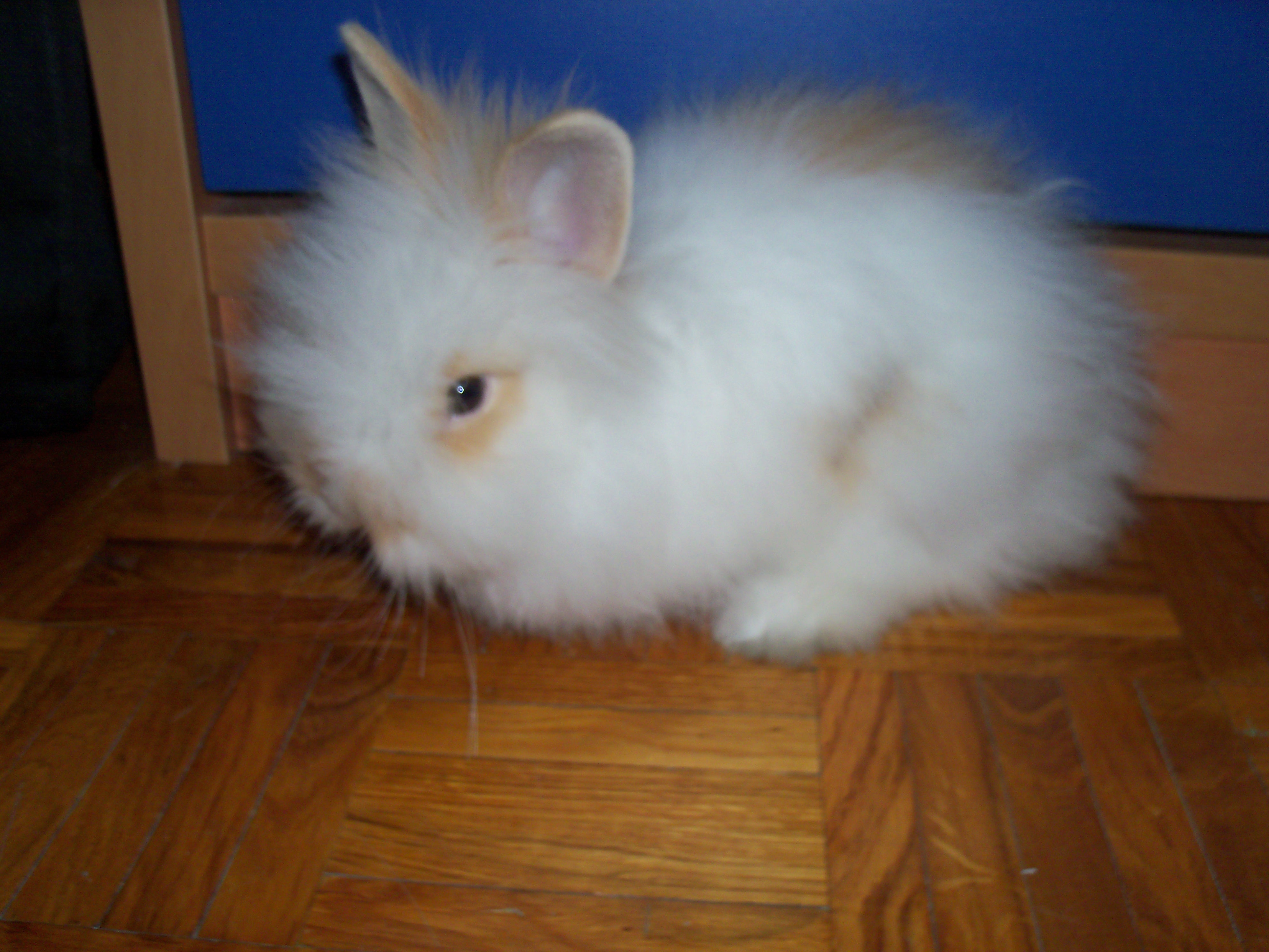 Conejo angora